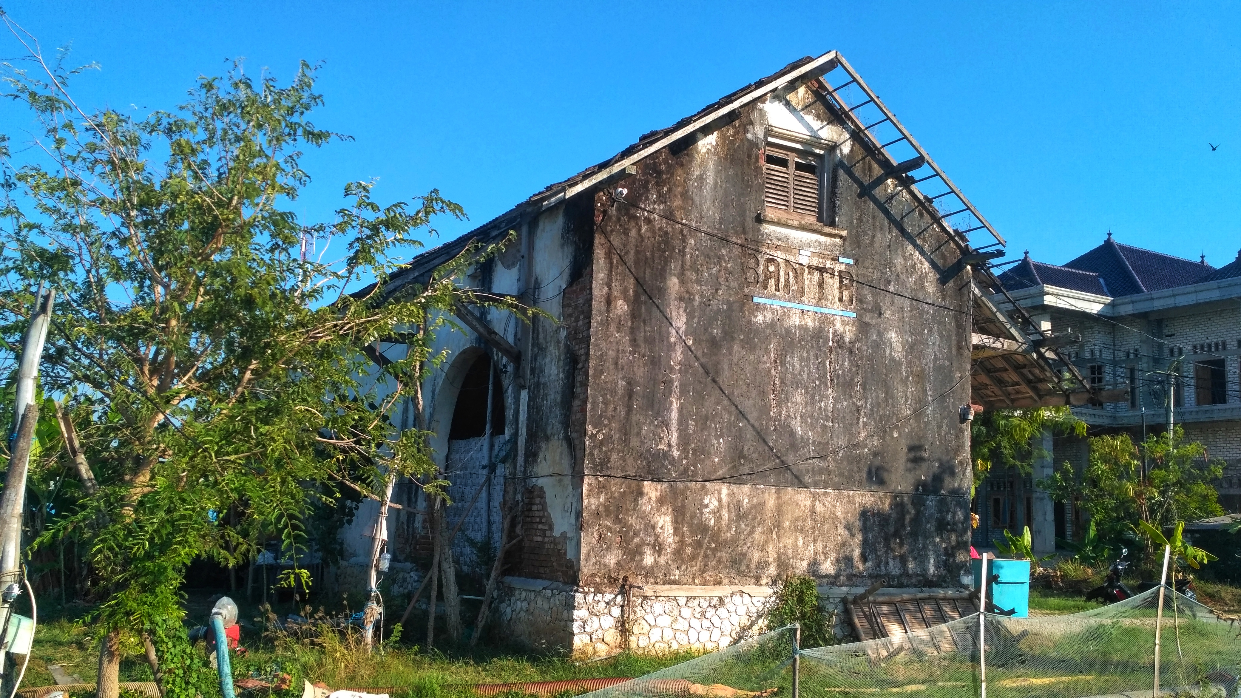 Wujud bangunan Stasiun Palang ketika dipotret dari arah barat. Terlihat dalam foto, pada dinding stasiun terdapat tulisan "Santre" yang merupakan bagian dari kata "Pesantren" yang tak lain dan tak bukan adalah nama lama stasiun sebelum berganti nama menjadi Stasiun Palang.